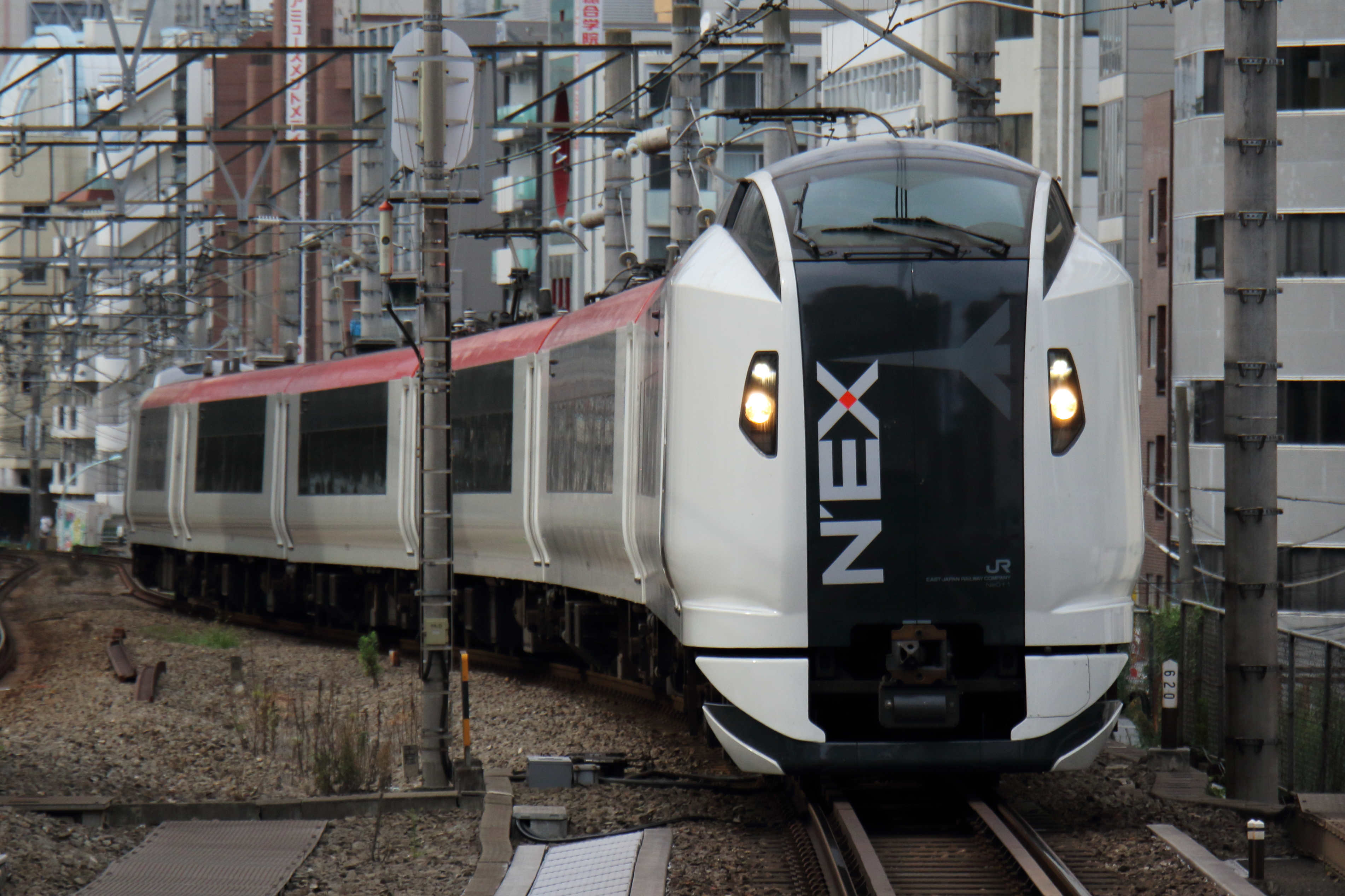 ＪＲ東日本E259系（成田エクスプレス） 恵比寿にて